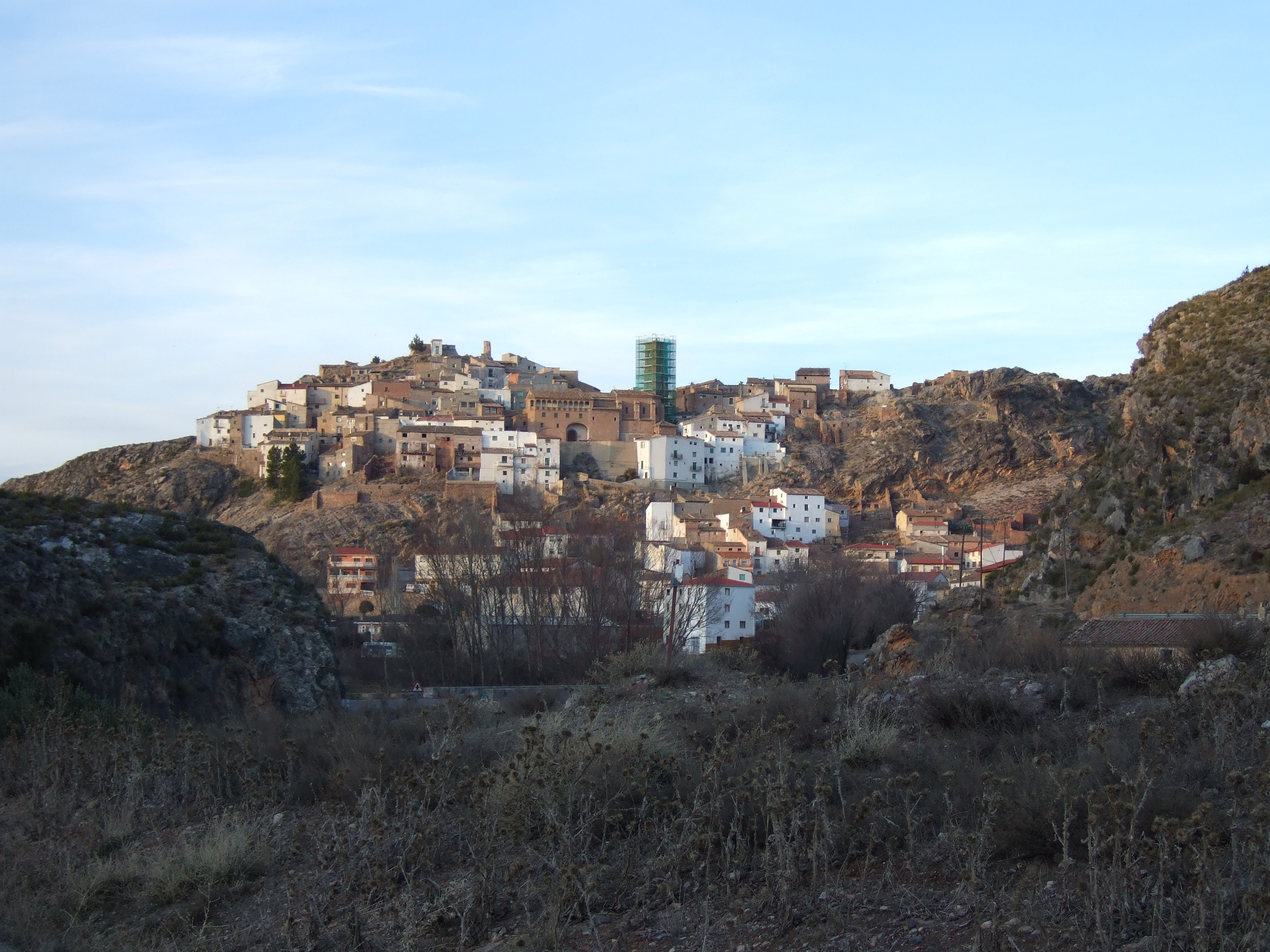 Vista de Tierga (Aragón; España)